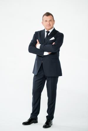 Фото Юрія Горбунова